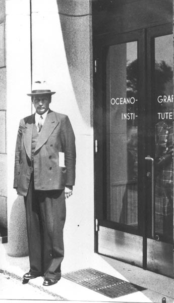 Hans Pettersson utanför Oceanografiska institutet i Göteborg.